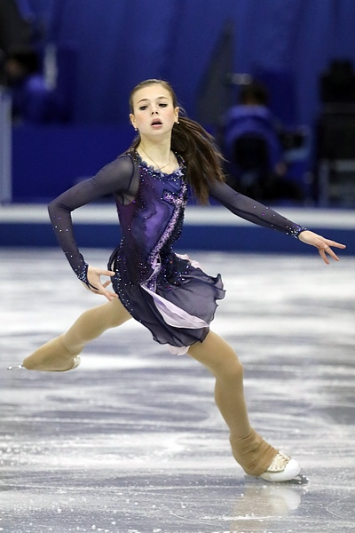 Анастасия Тараканова (Россия) на финале юниорского Гран-при 2017-2018